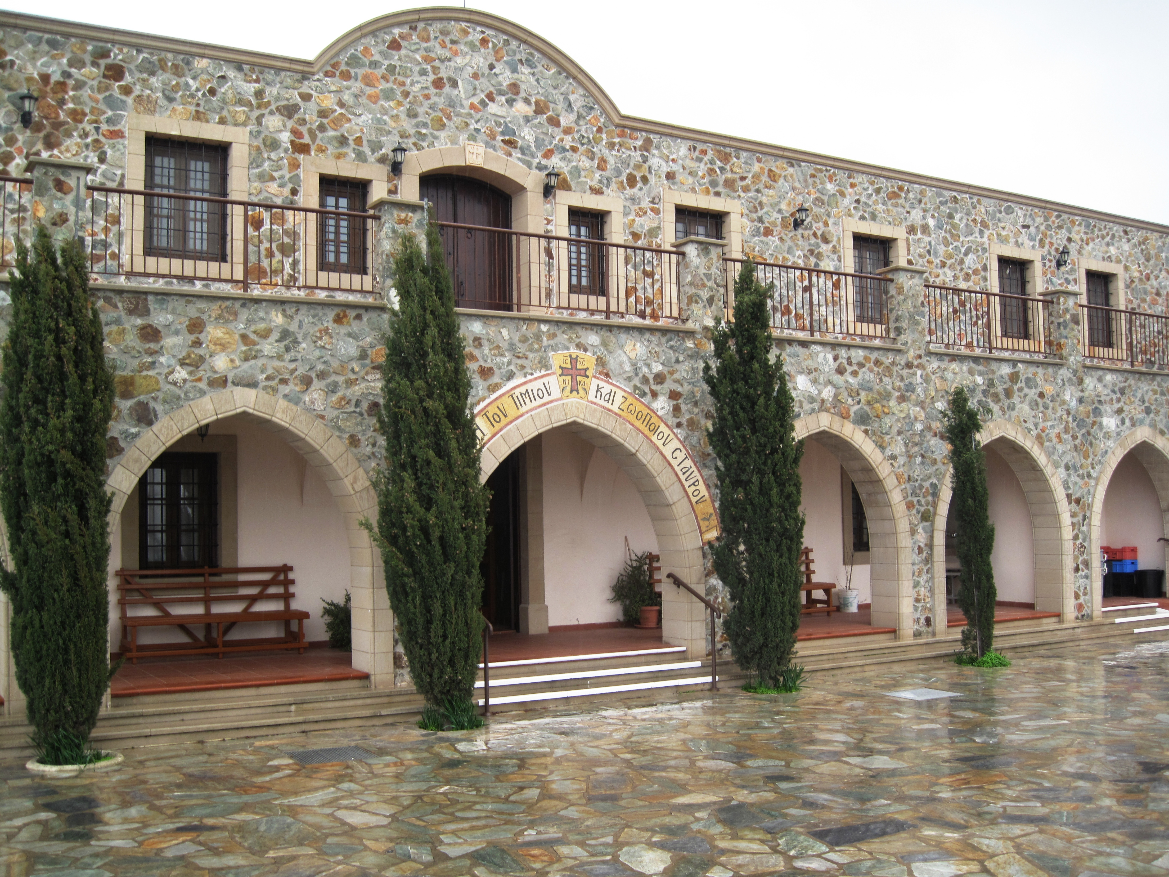 Stravrovoini klooster